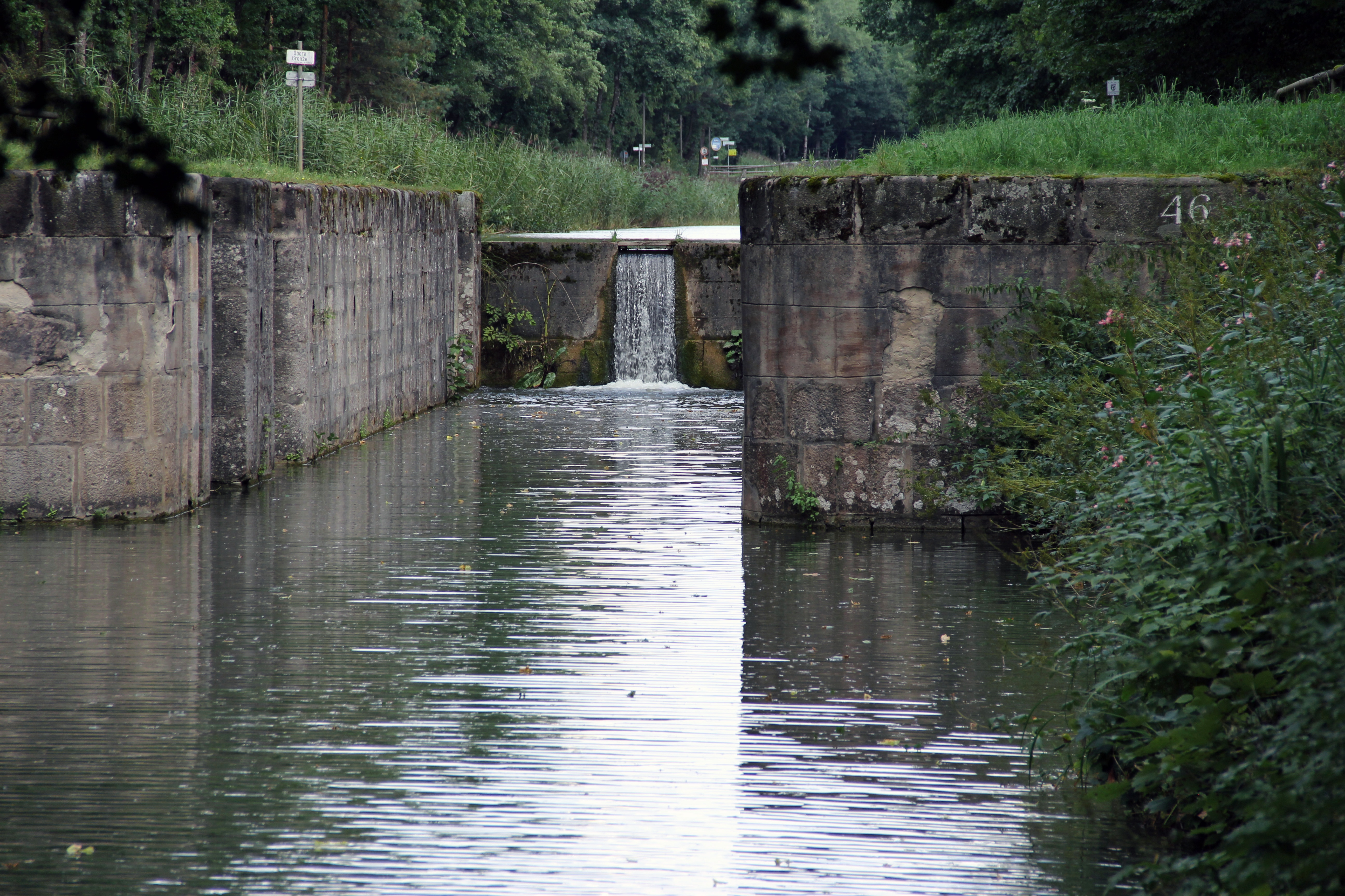 Schleuse 46, Ludwig-Donau-Main-Kanal